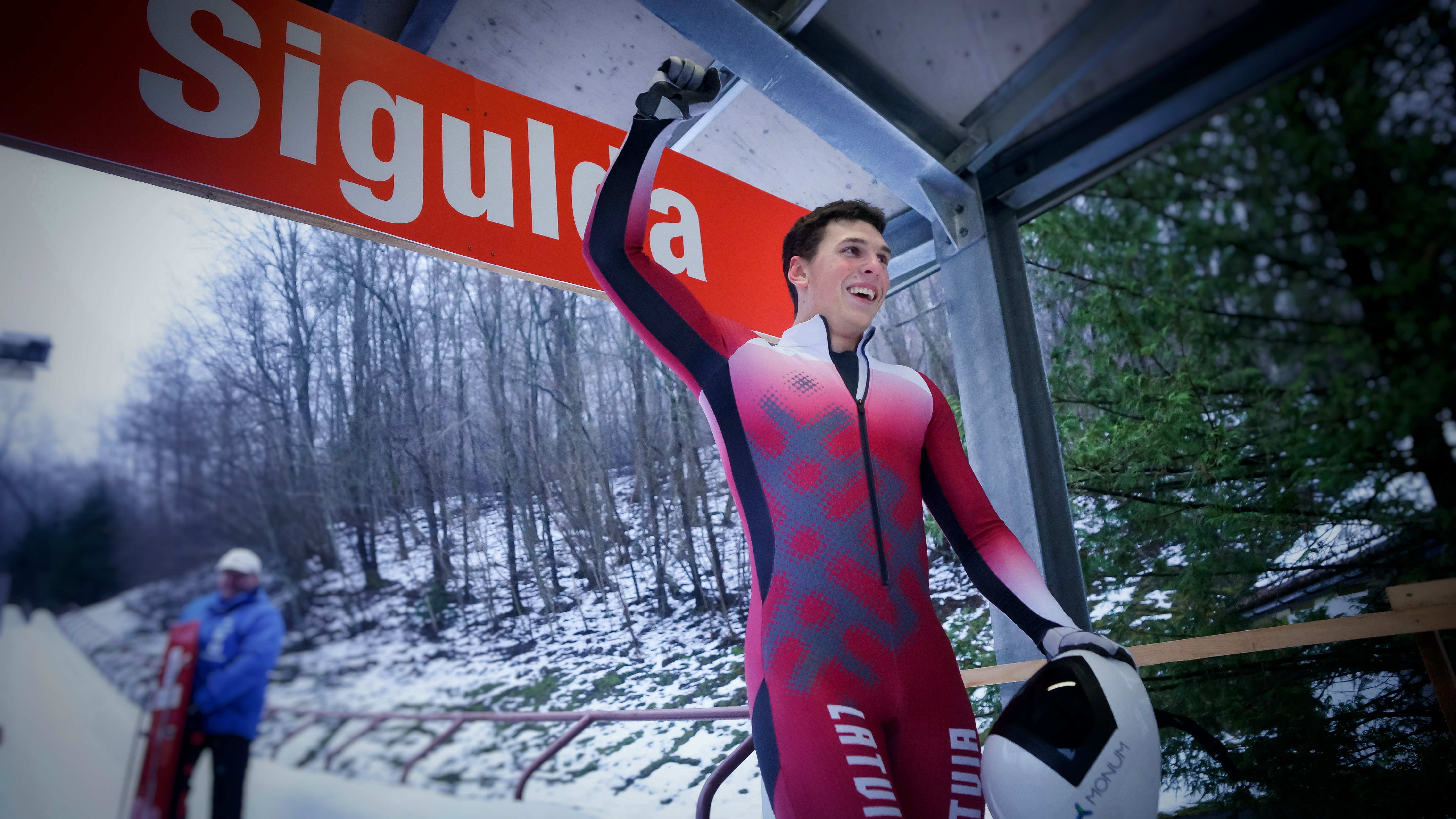 Latvijas skeletonists Krists Netlaus, Sigluldas trasē.